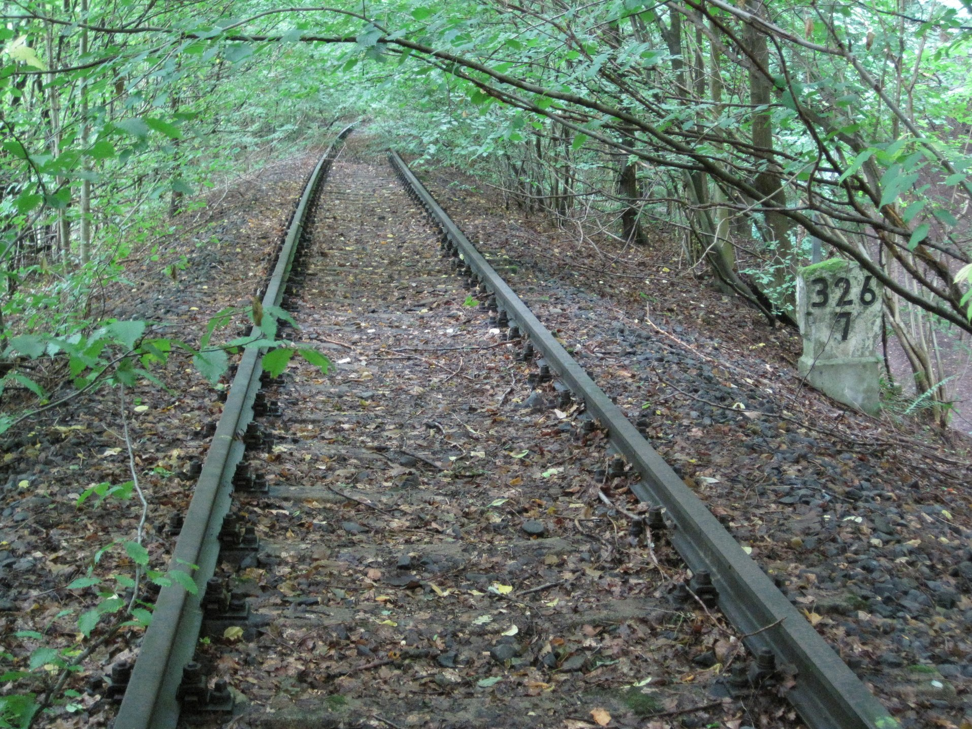 Bahnstrecke Holzminden–Scherfede in August 2011 at 326.7km